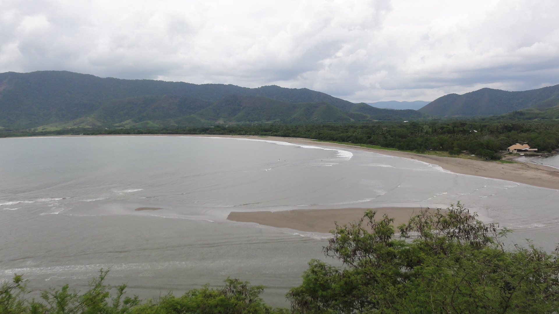 Plage de la Roche Percée